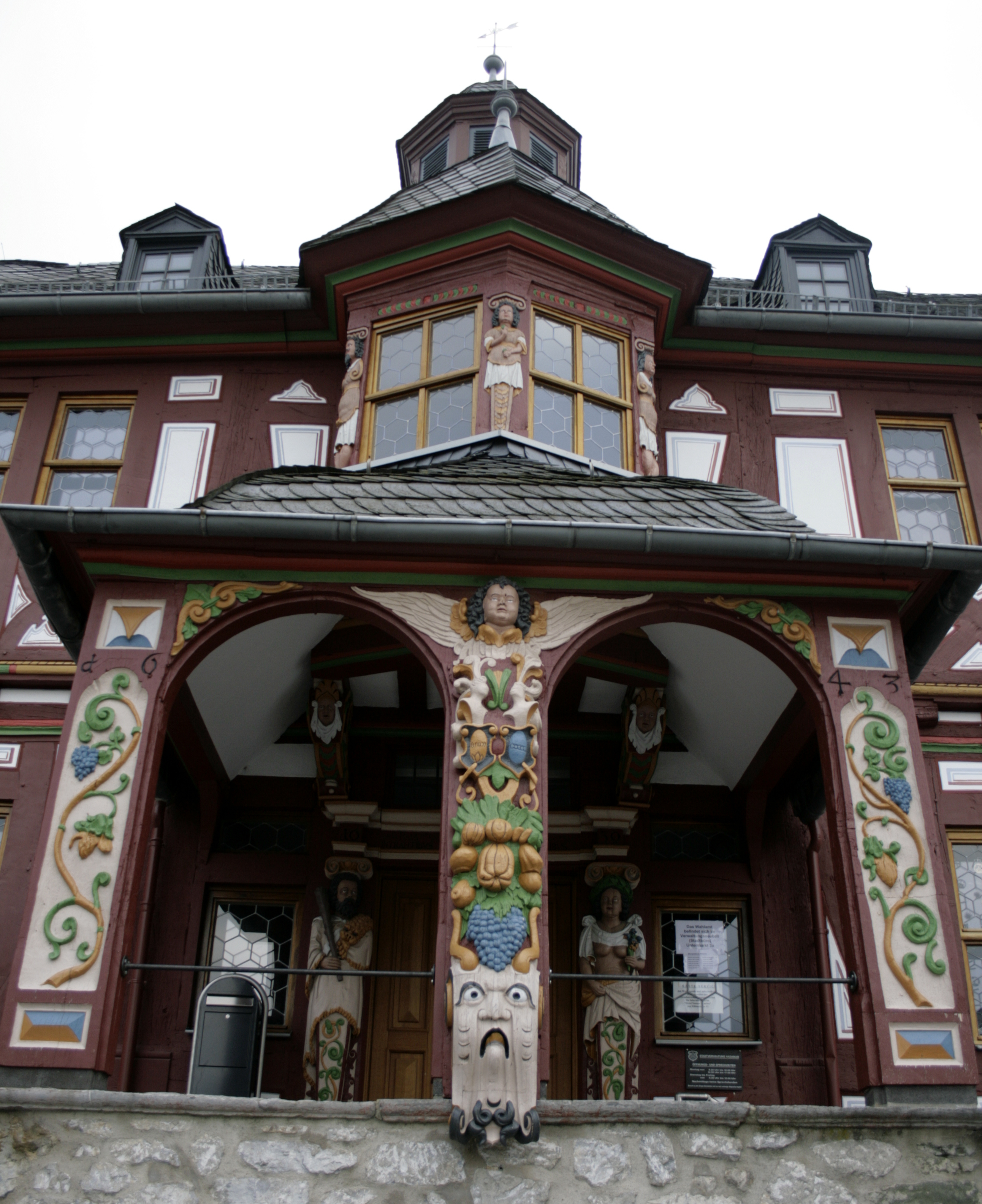 Portal des Rathauses in Hadamar, Deutschland